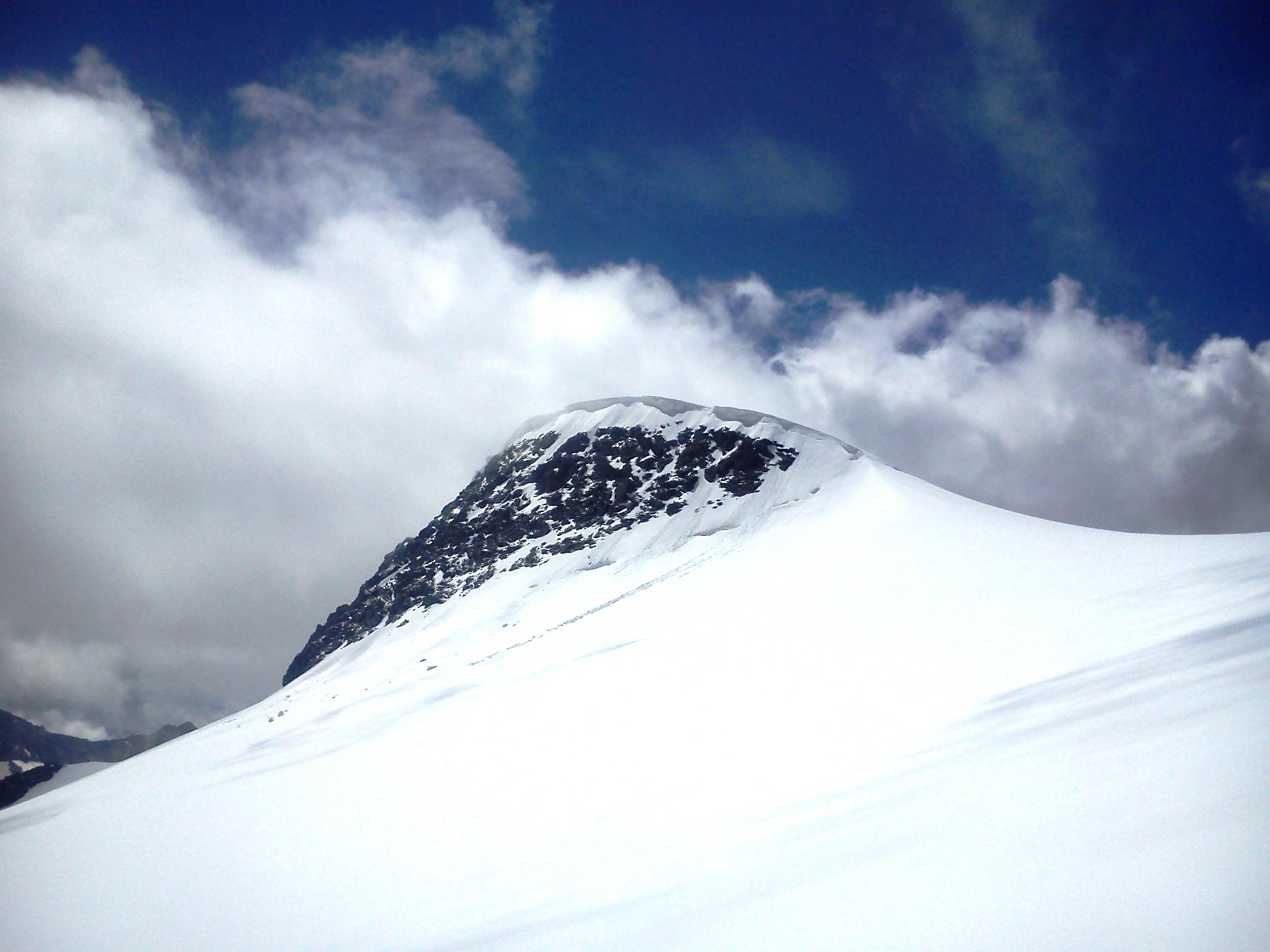 Vetta del Dome de l'Arpont